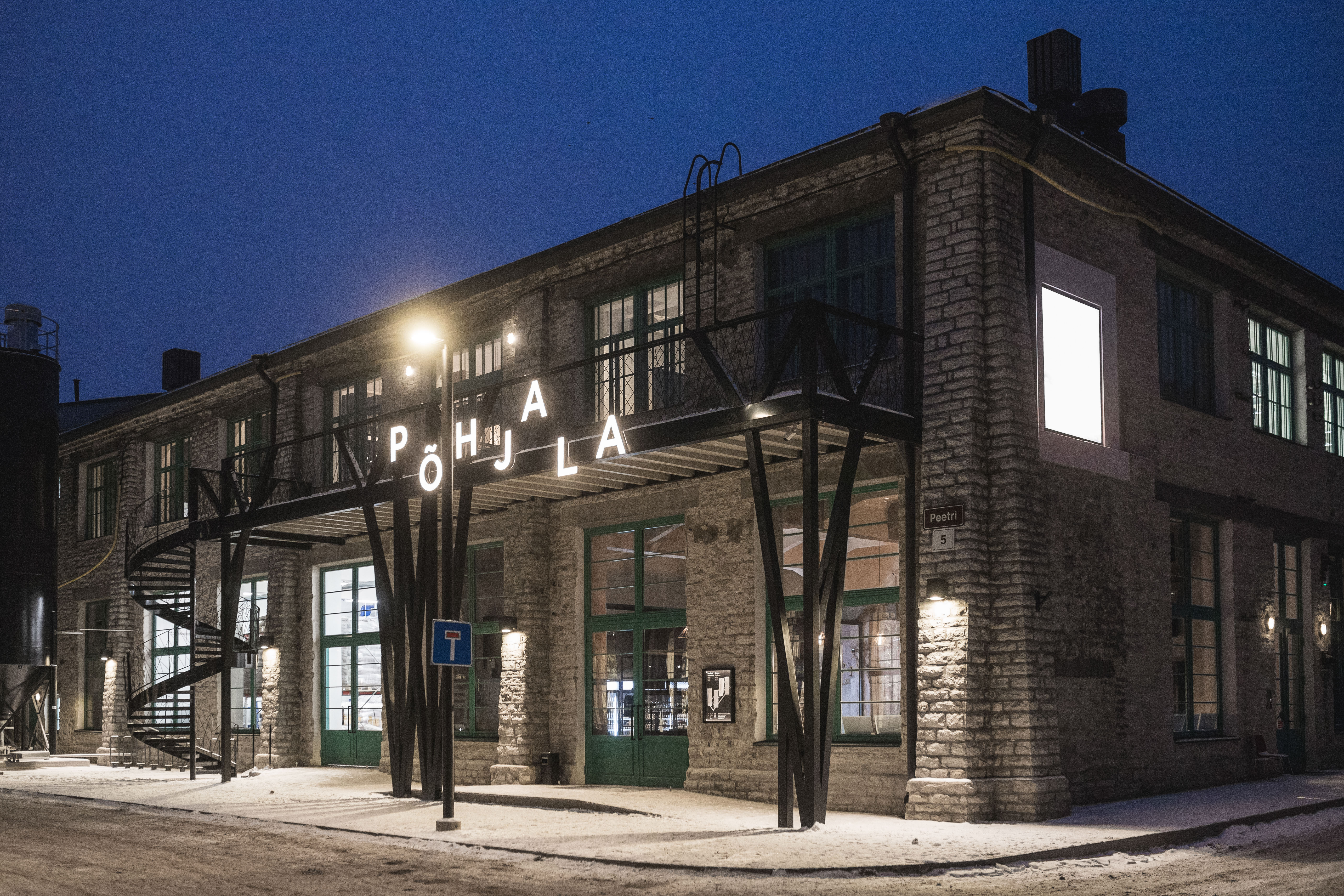 Põhjala Pruulikoda